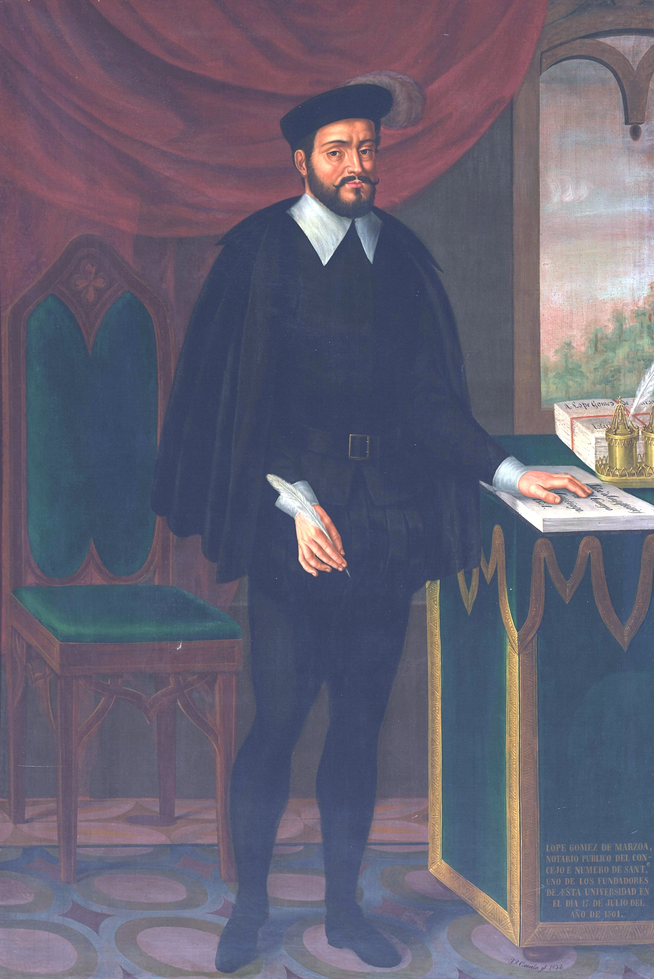 Retrato de Lope Gómez de Marzoa, oil on canvasmedium QS:P186,Q296955;P186,Q4259259,P518,Q861259. 170 x 107 cm.[1]